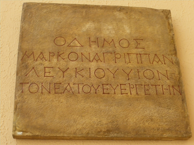 Copie d'une inscription dédicacée à Agrippa par le peuple d'Athènes. ca. 23 av. J.-C. Provenance : L'Acropole d'Athènes, Grèce. Localisation présente : Musée nationale d'archéologie d'Athènes, Grèce. Localisation de la copie : Musée de la civilisation romaine, Rome.